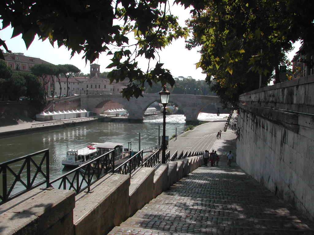 Roma, Tevere: imbarco dei battelli a Lungotevere degli Anguillara; sullo sfondo, Ponte Cestio e Isola Tiberina